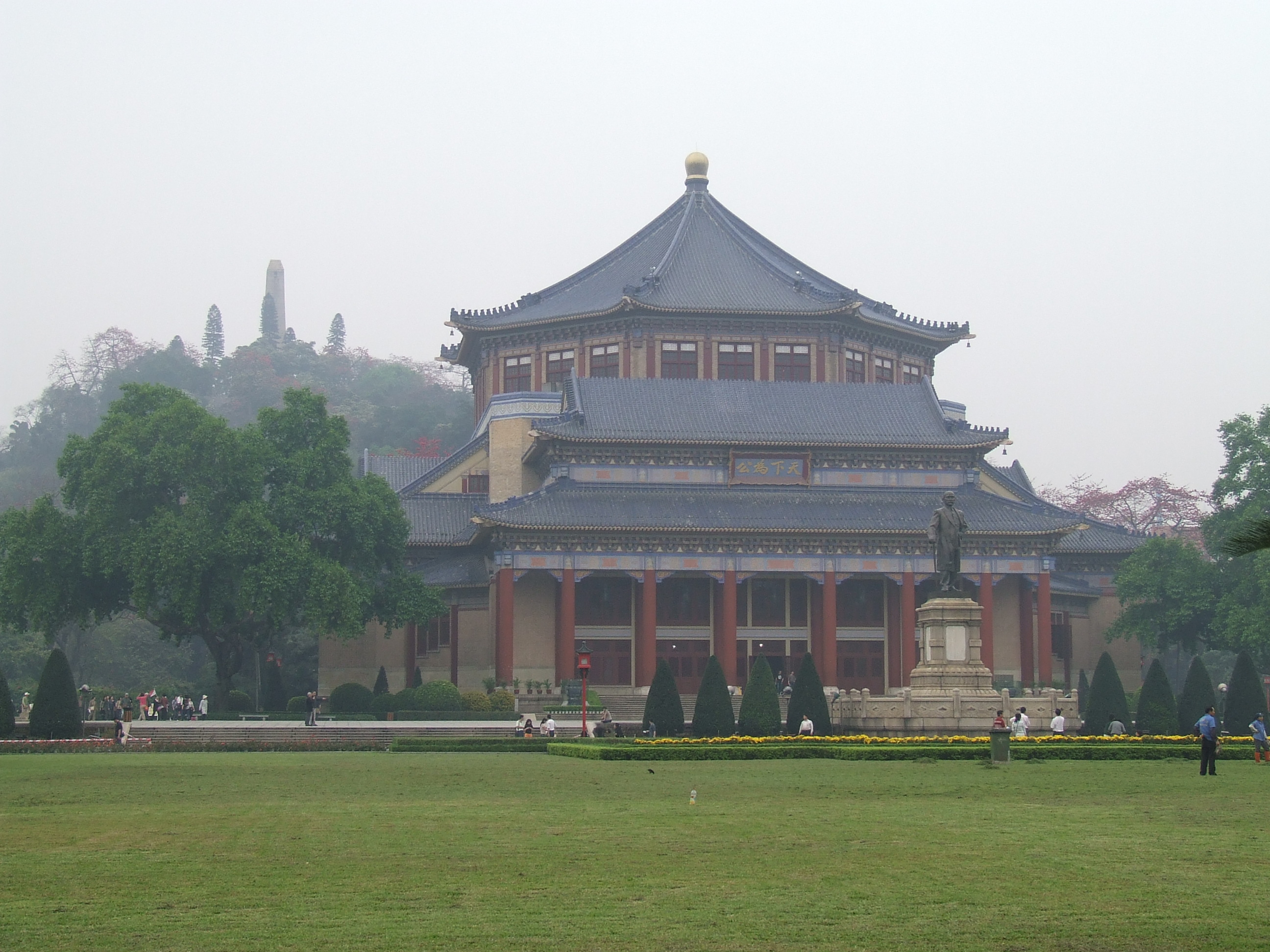 Dr. Sun Yat Sen Memorial Hall in Guangzhou